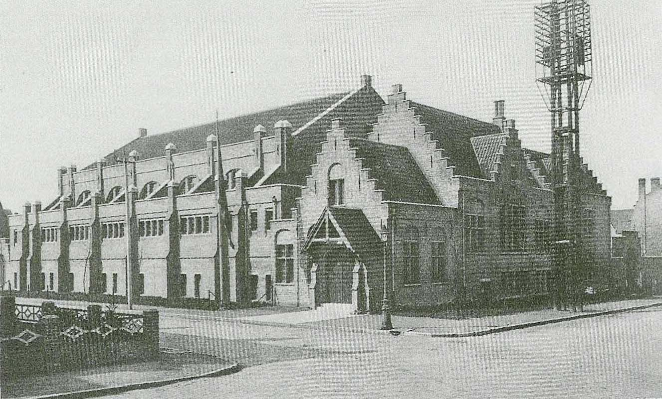 Jan Guilinizwembad - Brugge - West-Vlaanderen - België